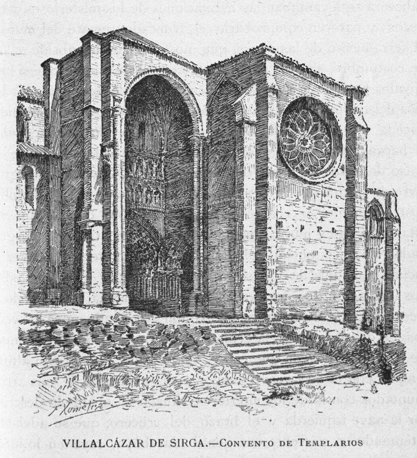 Villalcázar de Sirga. Convento de Templarios.